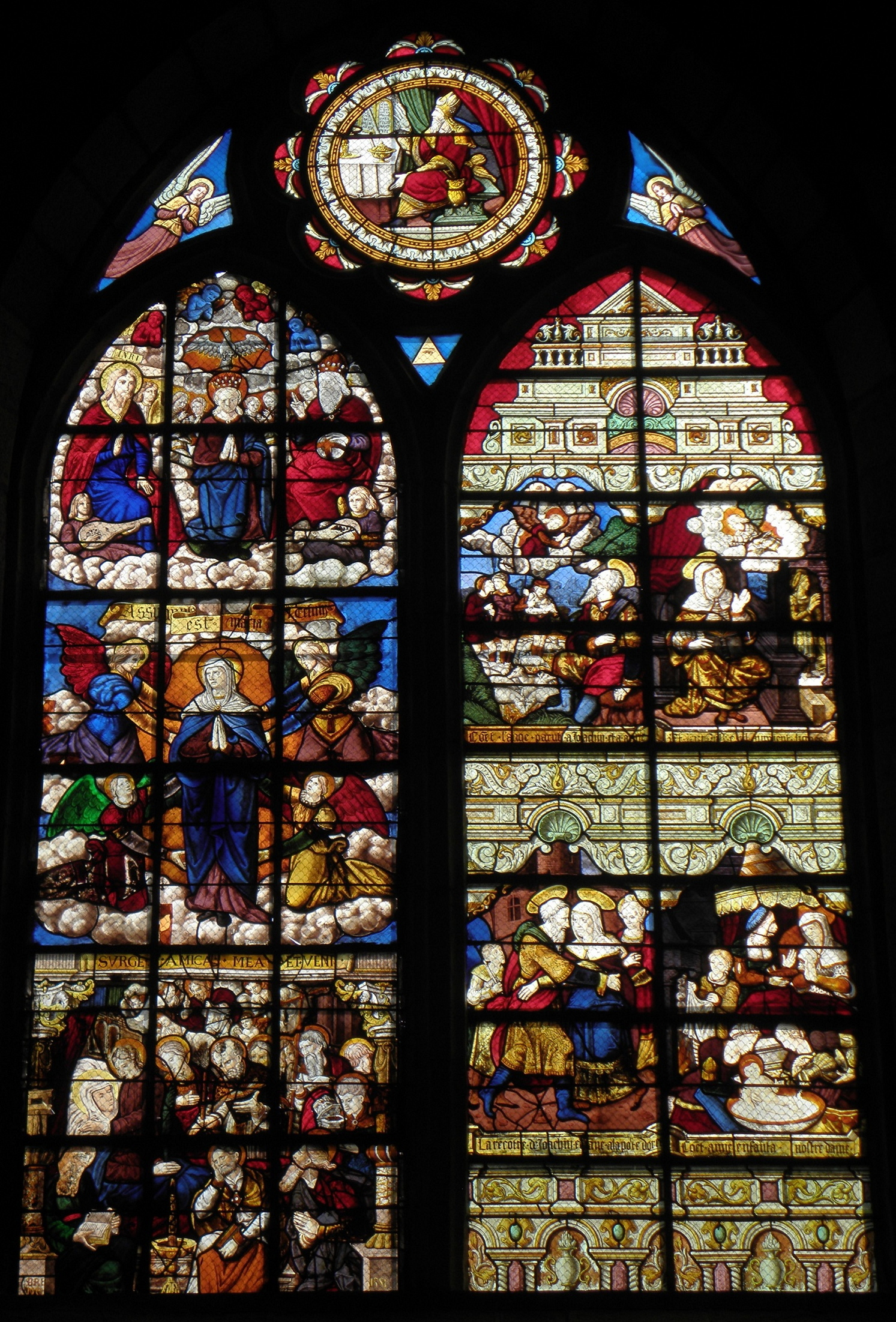 Maîtresse-vitre de l'église Notre-Dame de La Ferrière (22).